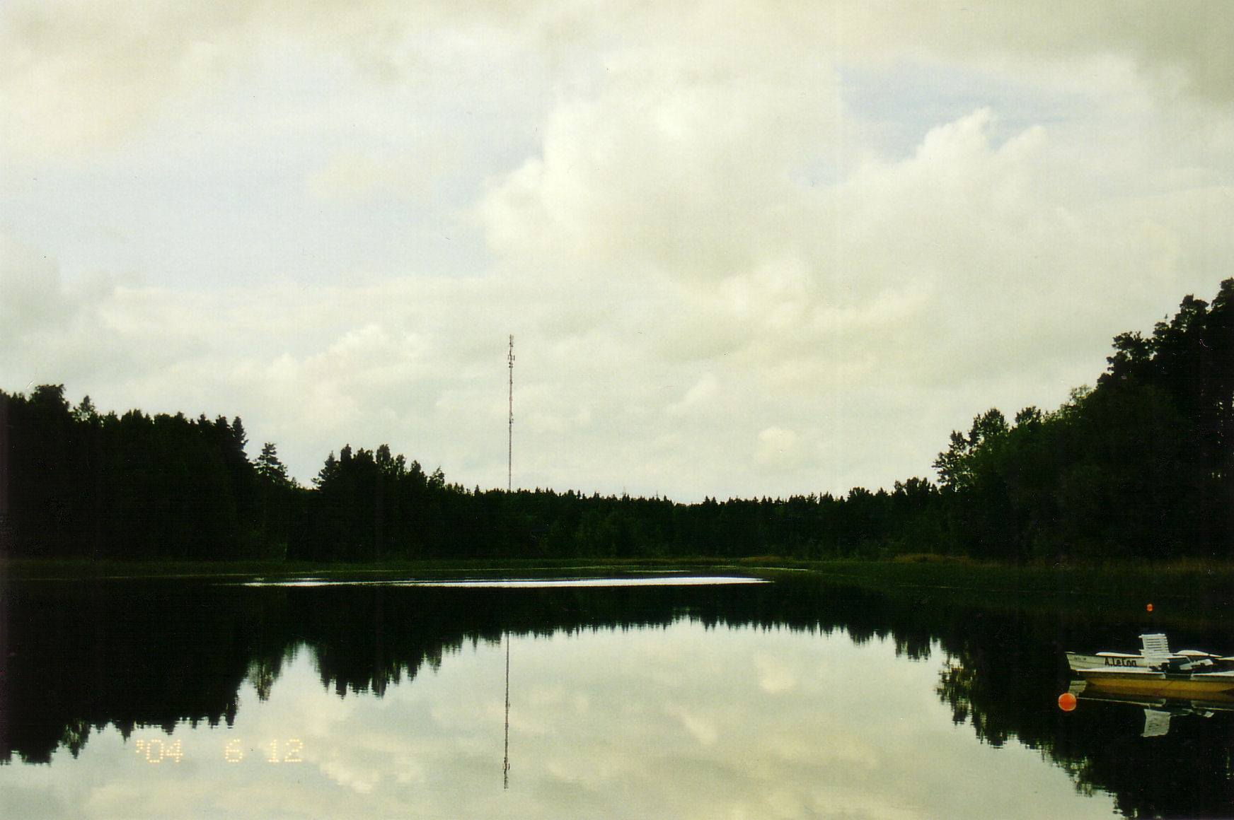 Vaade purdelt